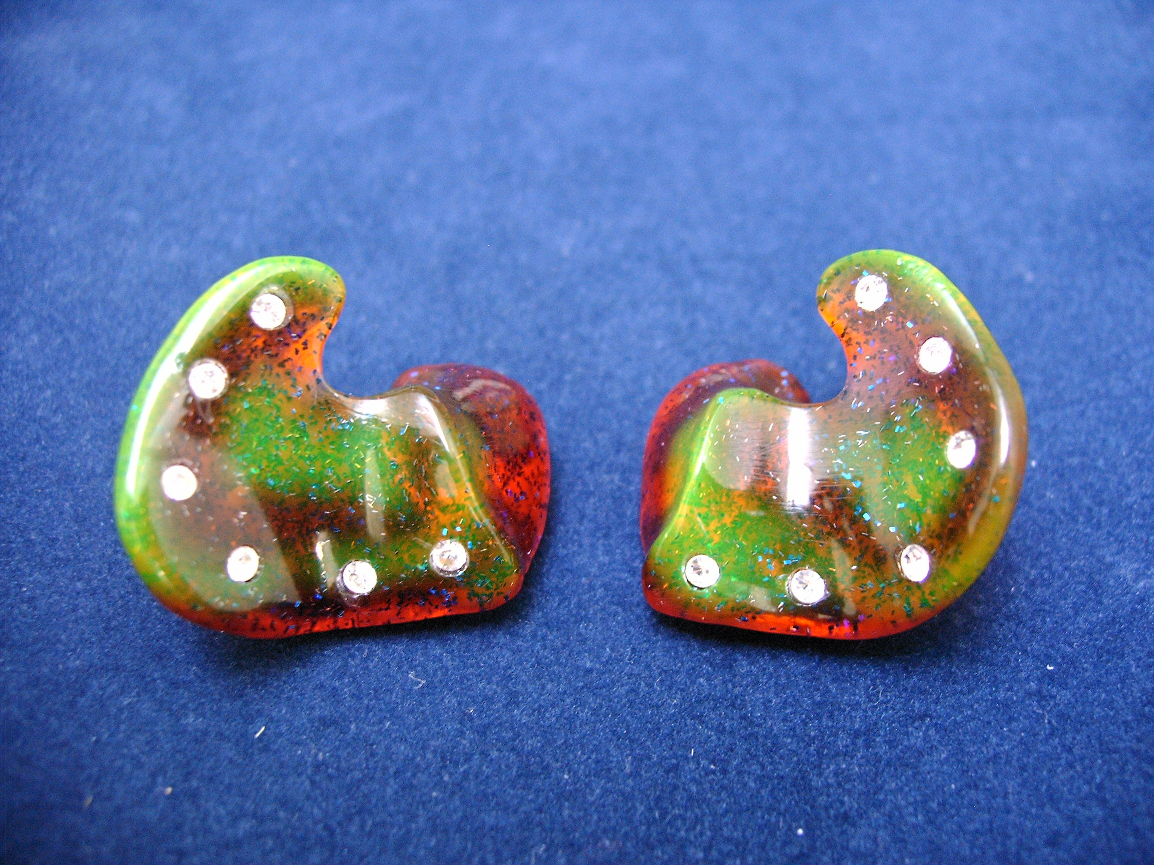 Ein Paar Schmuck-Gehörschutz-Otoplastiken aus Acryl (li+re), hart, ohne Bohrungen, Farbmischung aus rot und grün mit blauem Glitter, pro Otoplastik sind jeweils sechs Strasssteine eingearbeitet. Schalenform.